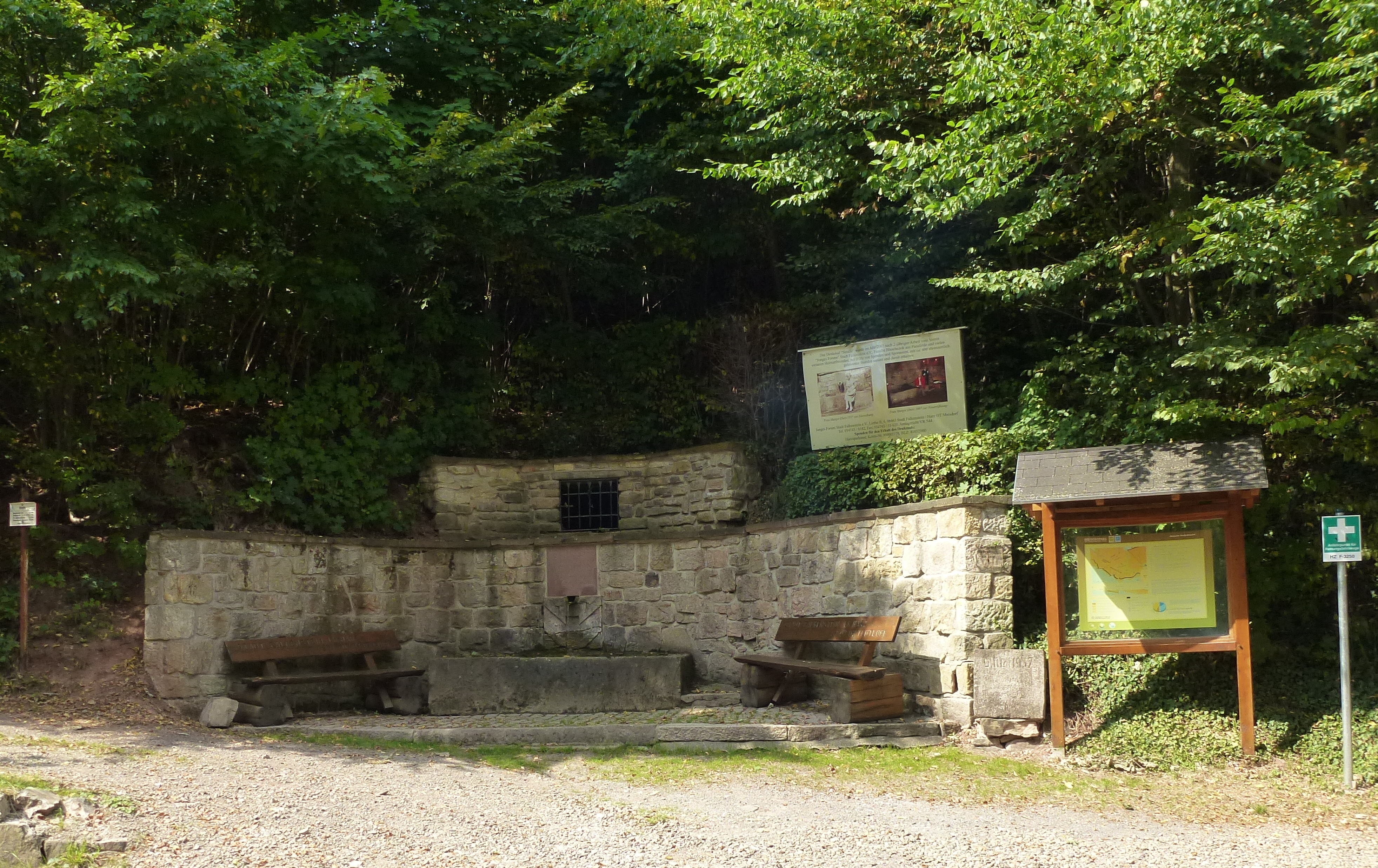 Die Strulle Meisdorf wird gespeist von einer Verwerfungsquelle aus dem Klusberg.